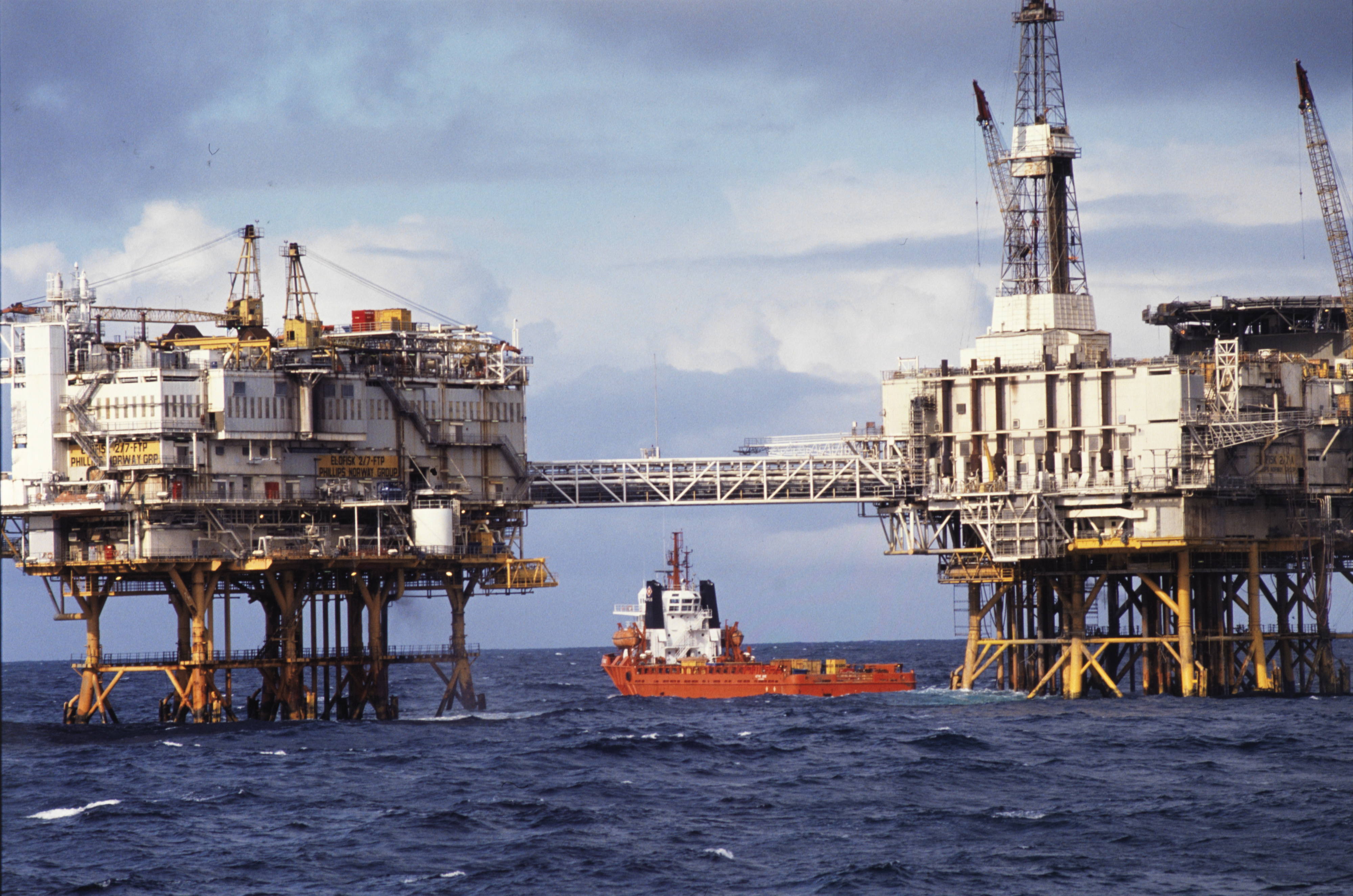 Foto av båt ved oljeplatform. Eldfisk oljeplatform. Ekofisk-feltet - operatør Phillips. Blokk 2/7 FTP Nordsjøen